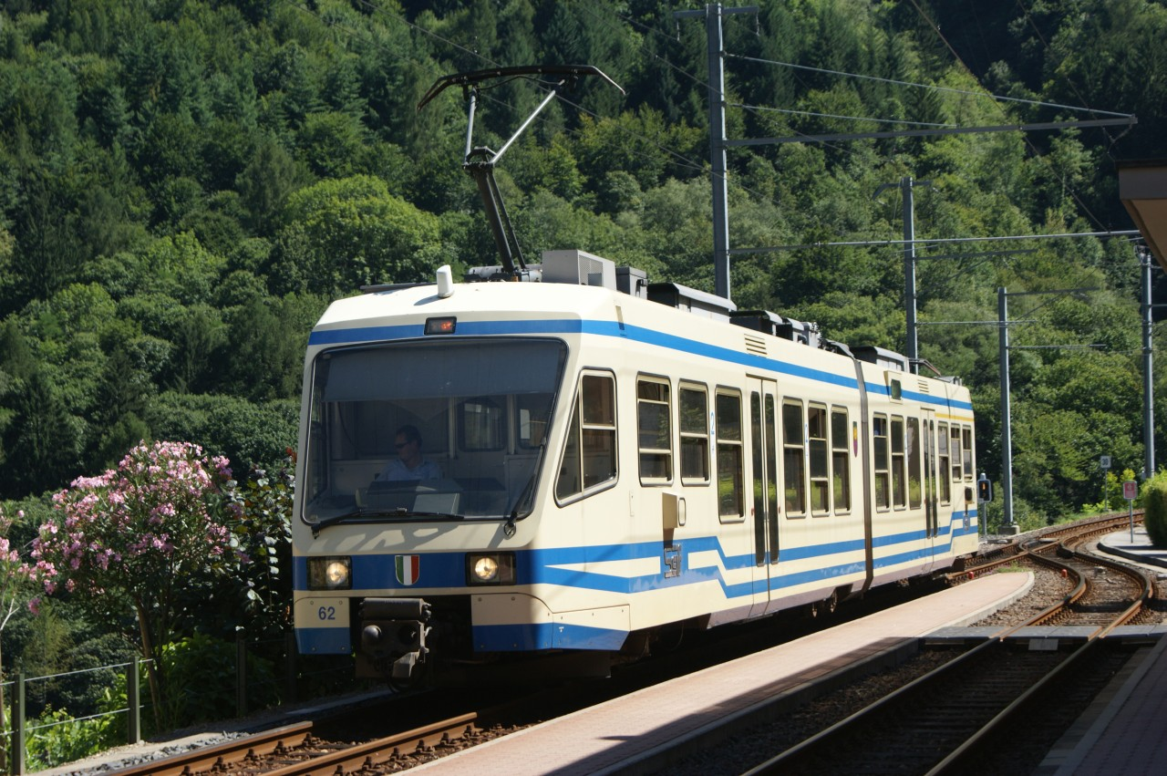 SSIF ABe 4/6 62 im Bahnhof Intragna.